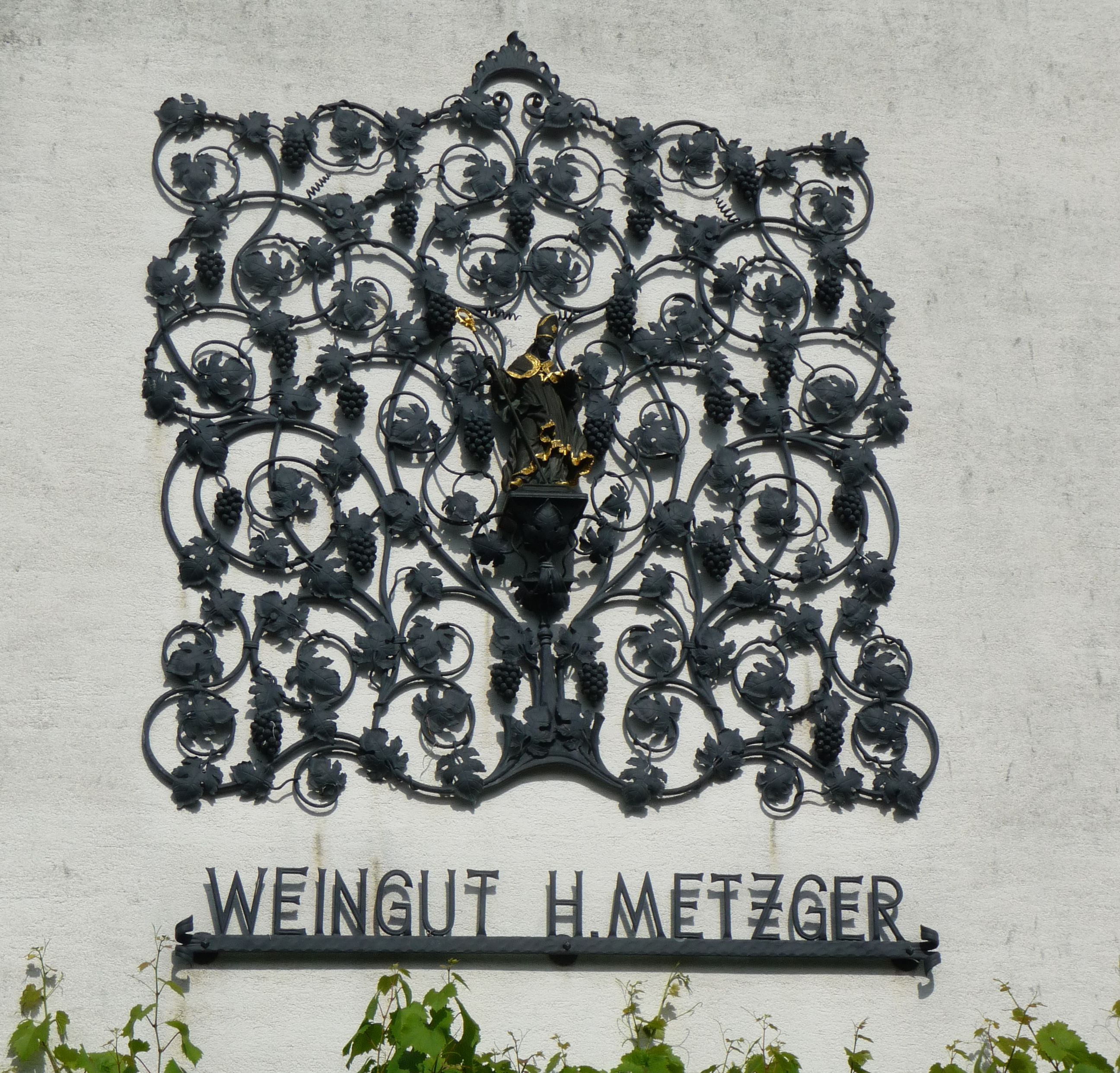 Weingut Metzger